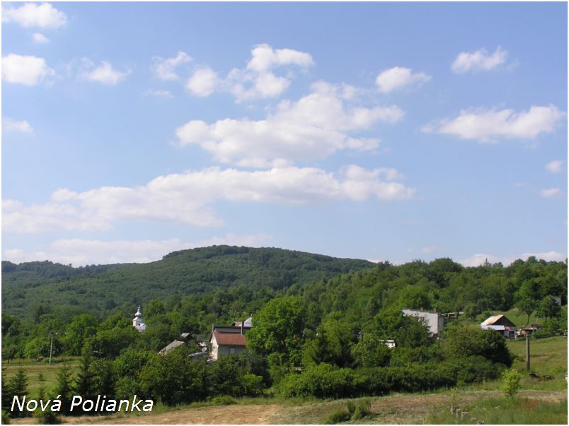 Celkový pohľad